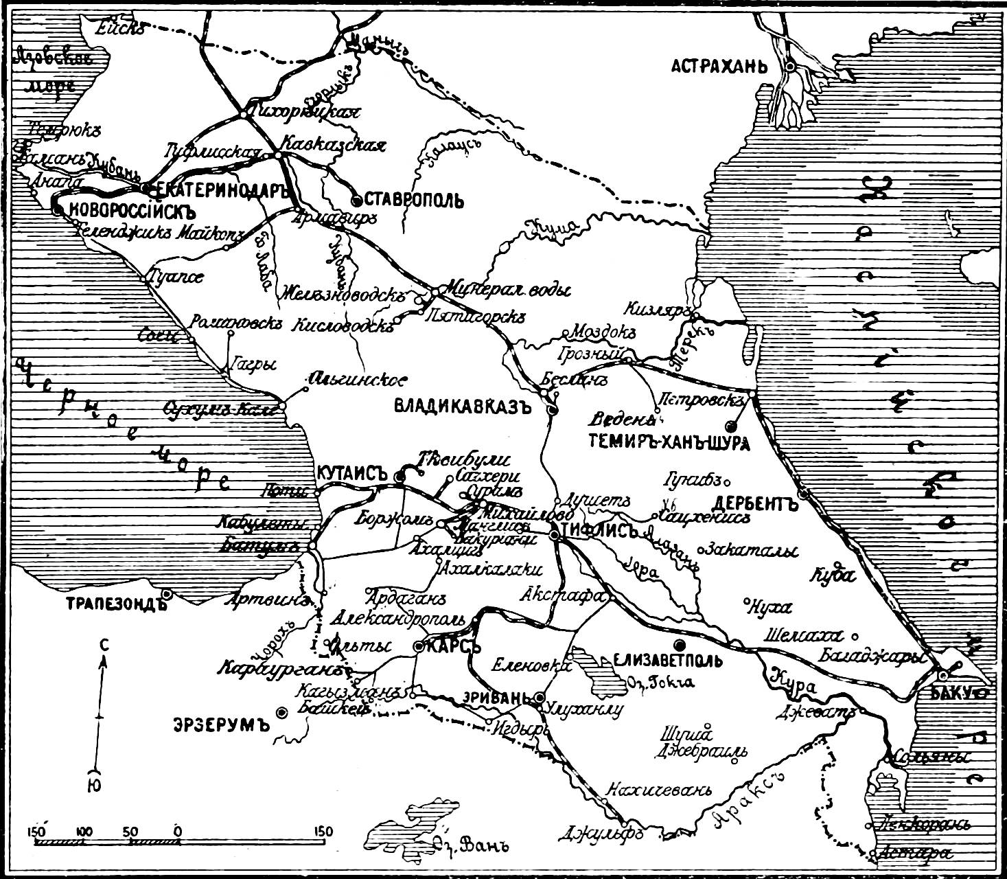 Это изображение было использовано для иллюстрирования статьи «Кавказский военный округ» опубликованной в одиннадцатом томе «Военной энциклопедии», который был издан книгоиздательским товариществом И. Д. Сытина в 1913 году в столице Российской империи городе Санкт-Петербурге.